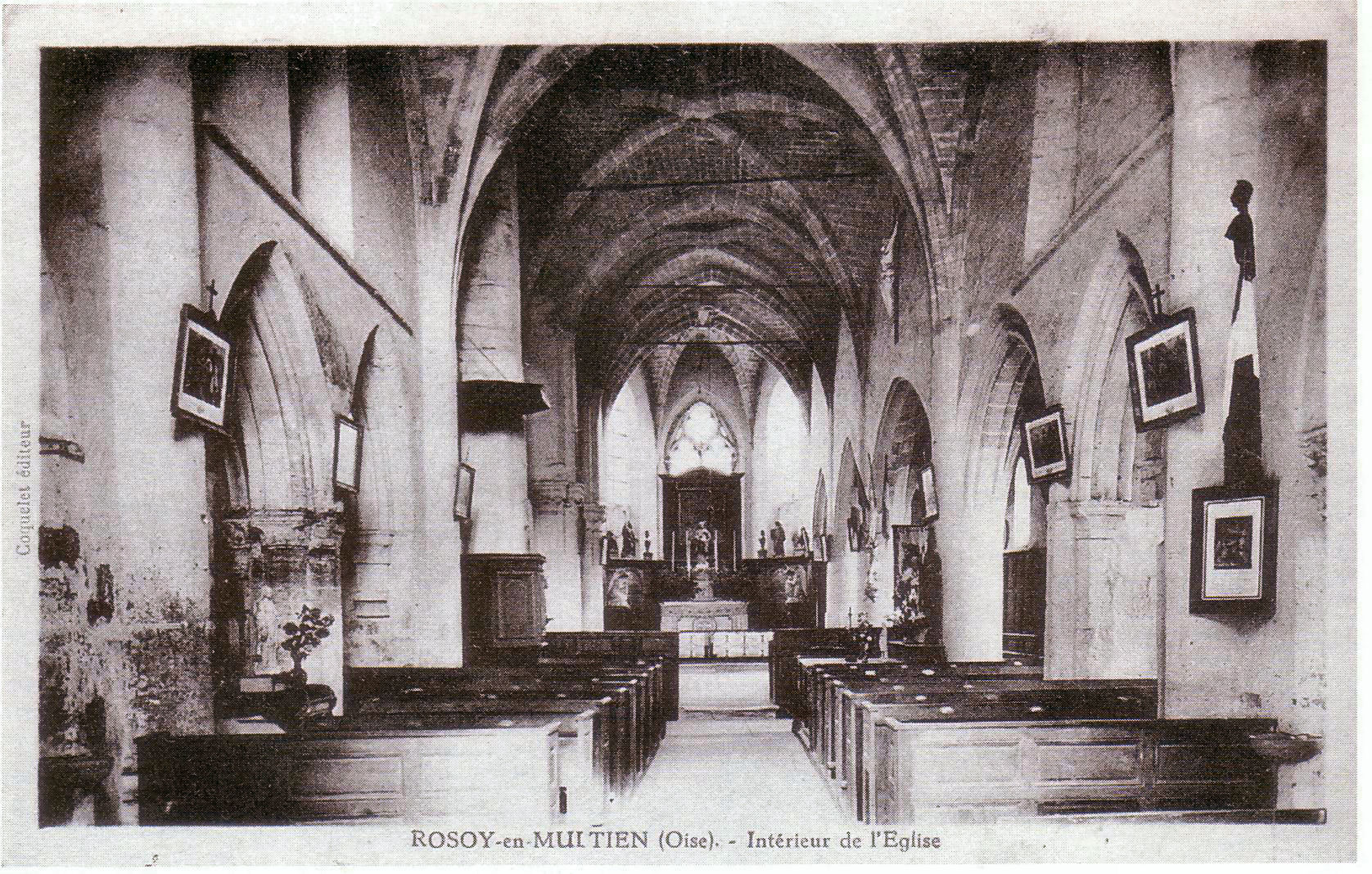 Nef centrale du XVIe siècle